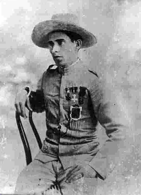 Eustaquio Gopar